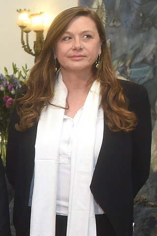 Gobierno de Chile